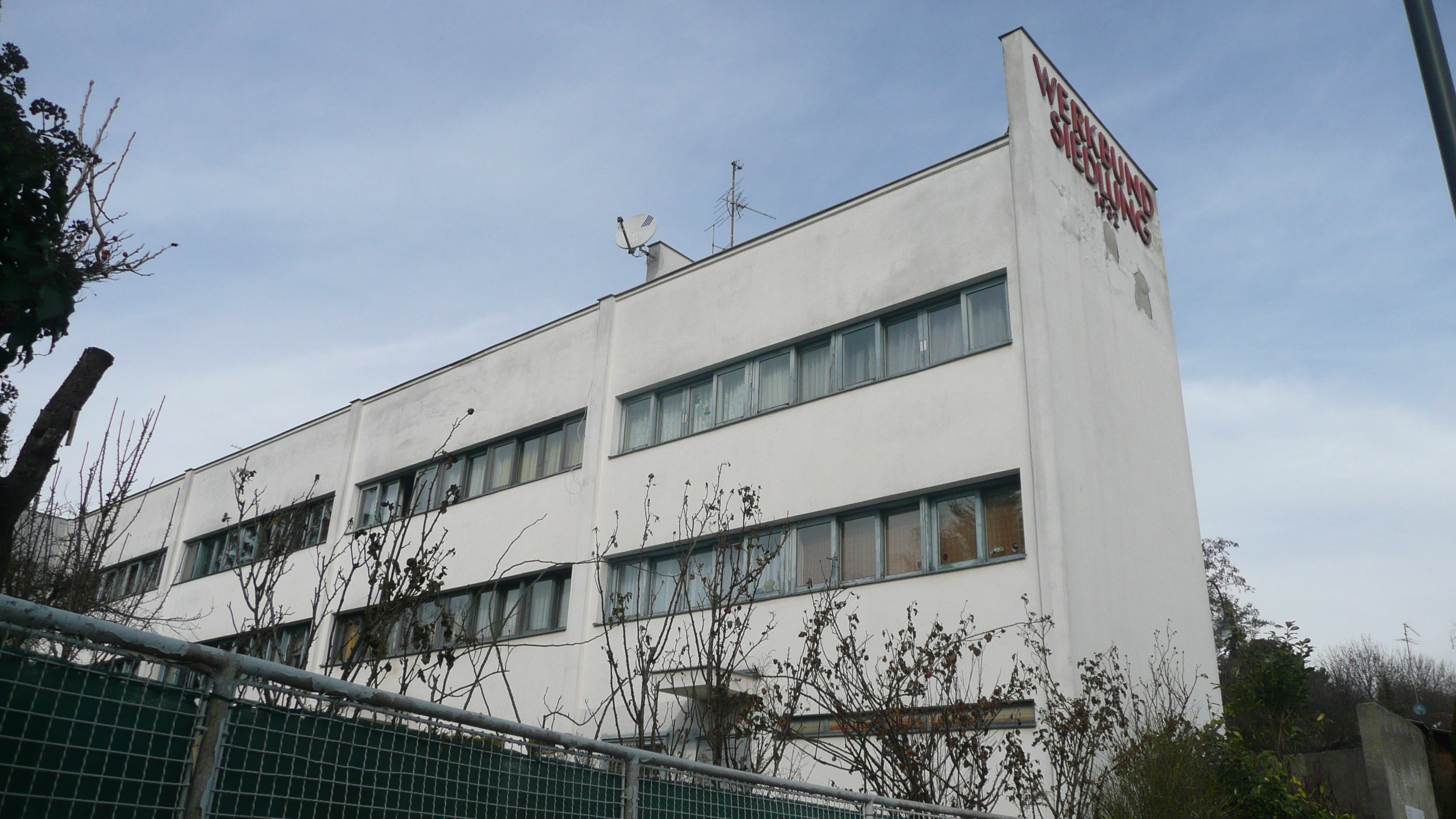 Werkbundsiedlung Wien, Veitingergasse 87-93